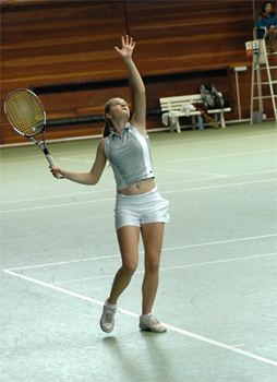 Златка Петрова (Локомотив Пловдив), Тенис; 2006 Пламен Ташев